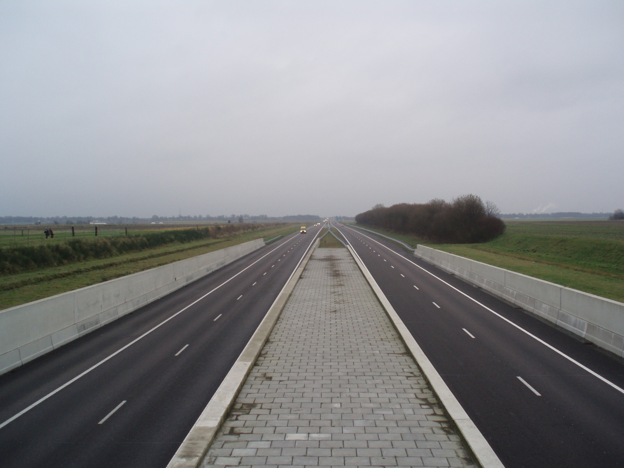 Rijksweg 37 gezien vanaf het viaduct Erica.